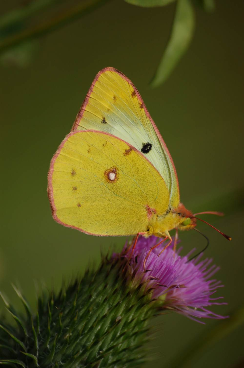 Colias hyale